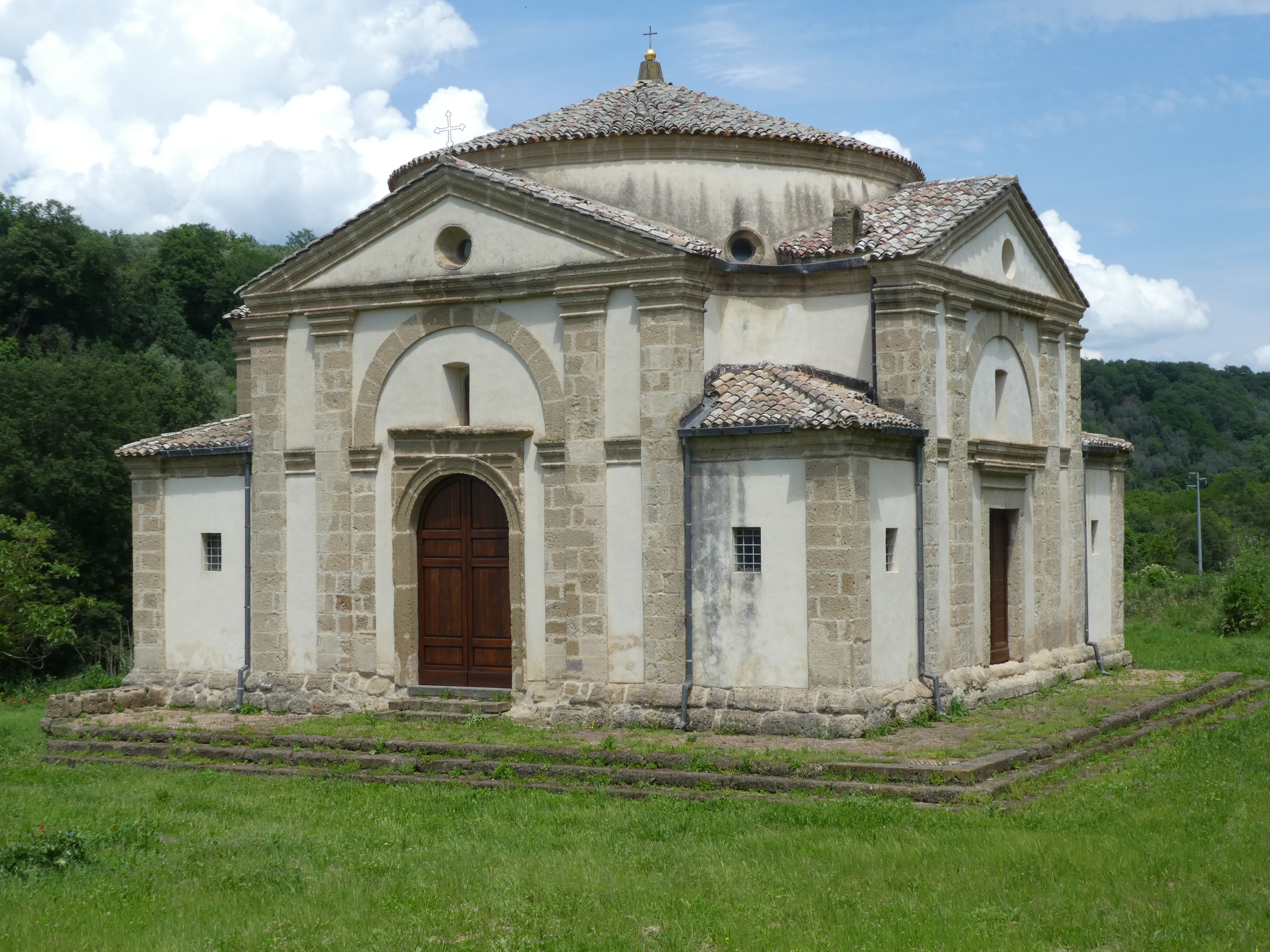 Chiesa di sant'Egidio a Cellere Object location42° 30′ 33.76″ N, 11° 46′ 05.74″ E